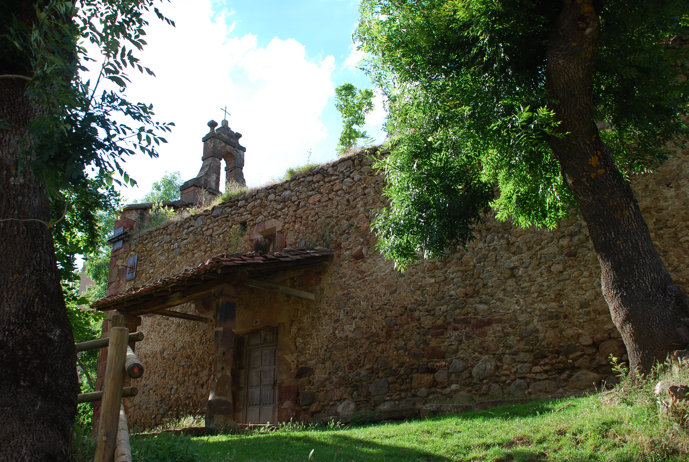 Iglesia de Turza, aldea de Ezcaray (La Rioja, España)